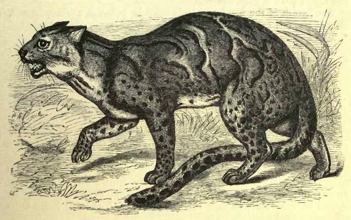 Marbled tiger-cat